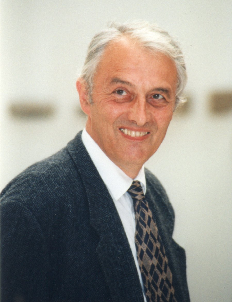 Volkmar Enderlein bei der Feier zu seinem 60. Geburtstag im Mschatta-Saal (Museum für Islamische Kunst in Berlin); Pentax Z 20, Tamron Zoom AF/MF 3,8-5,6/28-200 mm aspherical